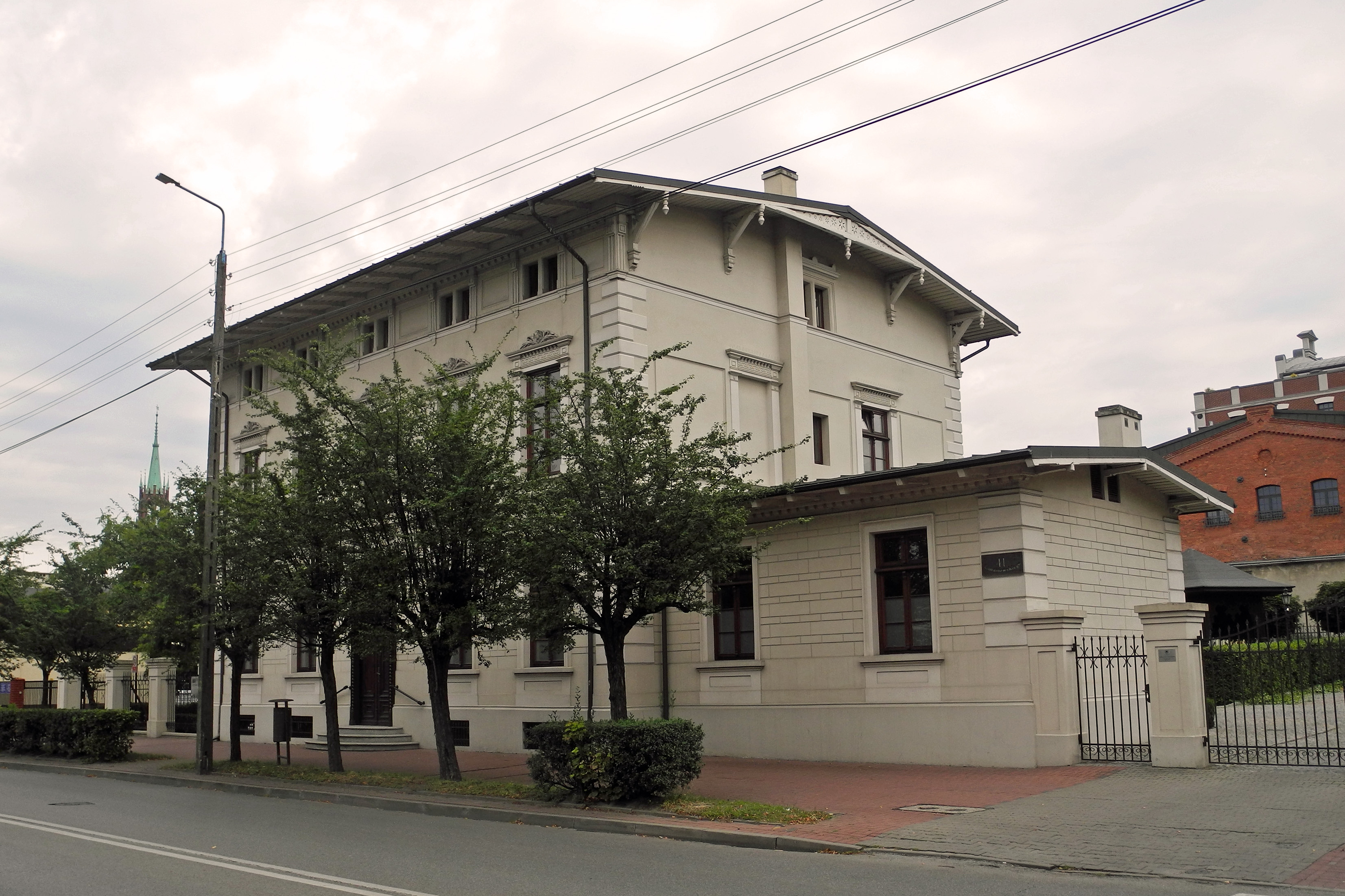 Das Tiroler Haus mit Nebengebäude in Żyrardów, Limanowski-Str. 41-43, erbaut von Carl August Dittrich in den 1870er Jahren für seinen Schwiegersohn, den österreichischen Kaufmann Louis Marcellin (1850–1889), siehe [1].